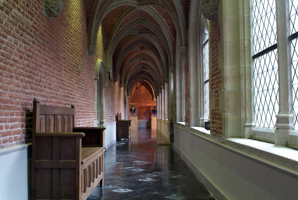 le cloitre